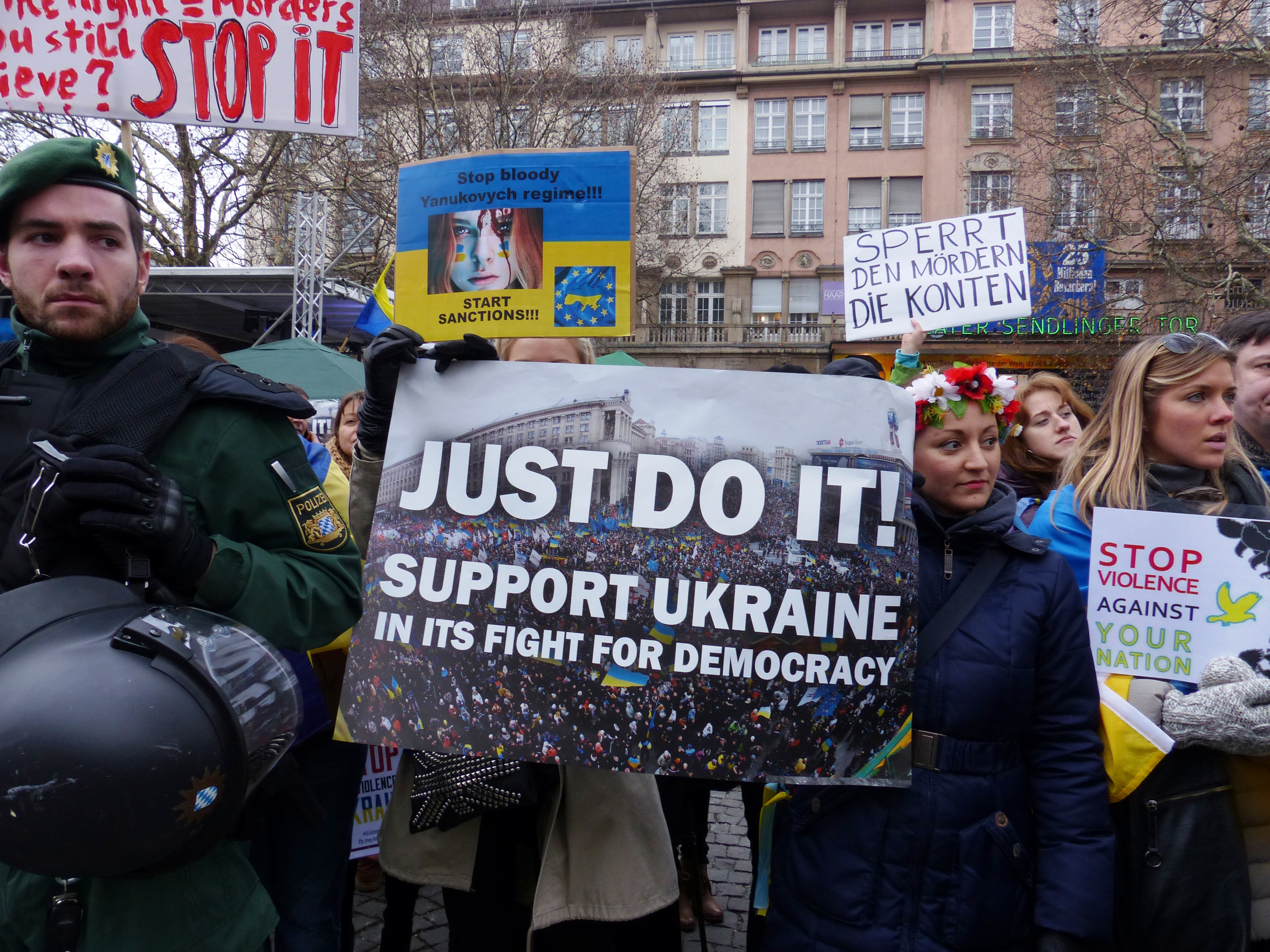 Ukraine Demonstration bei Demonstration gegen die Sichtheitskonferenz 1.2.2014 - München